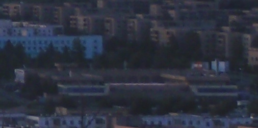 Торговый центр города Эрдэнэт